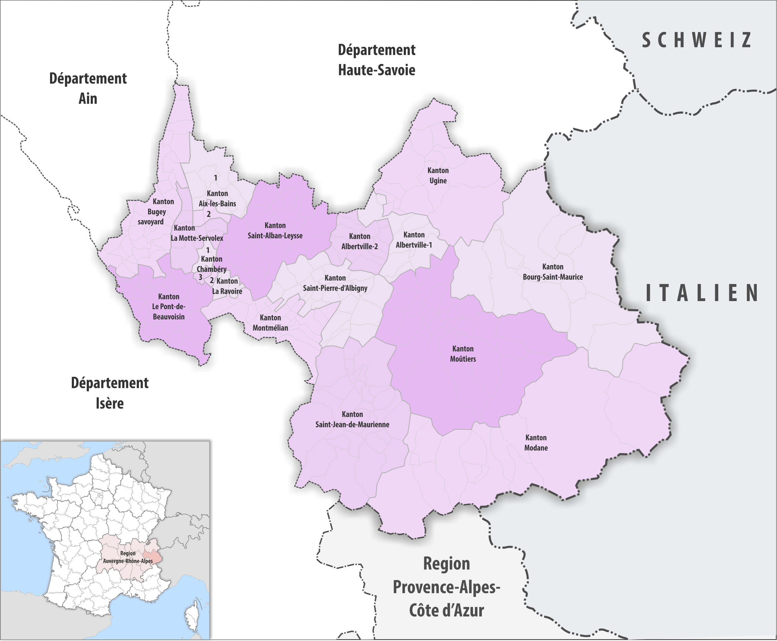 Gemeinden und Kantone im Departement Savoie